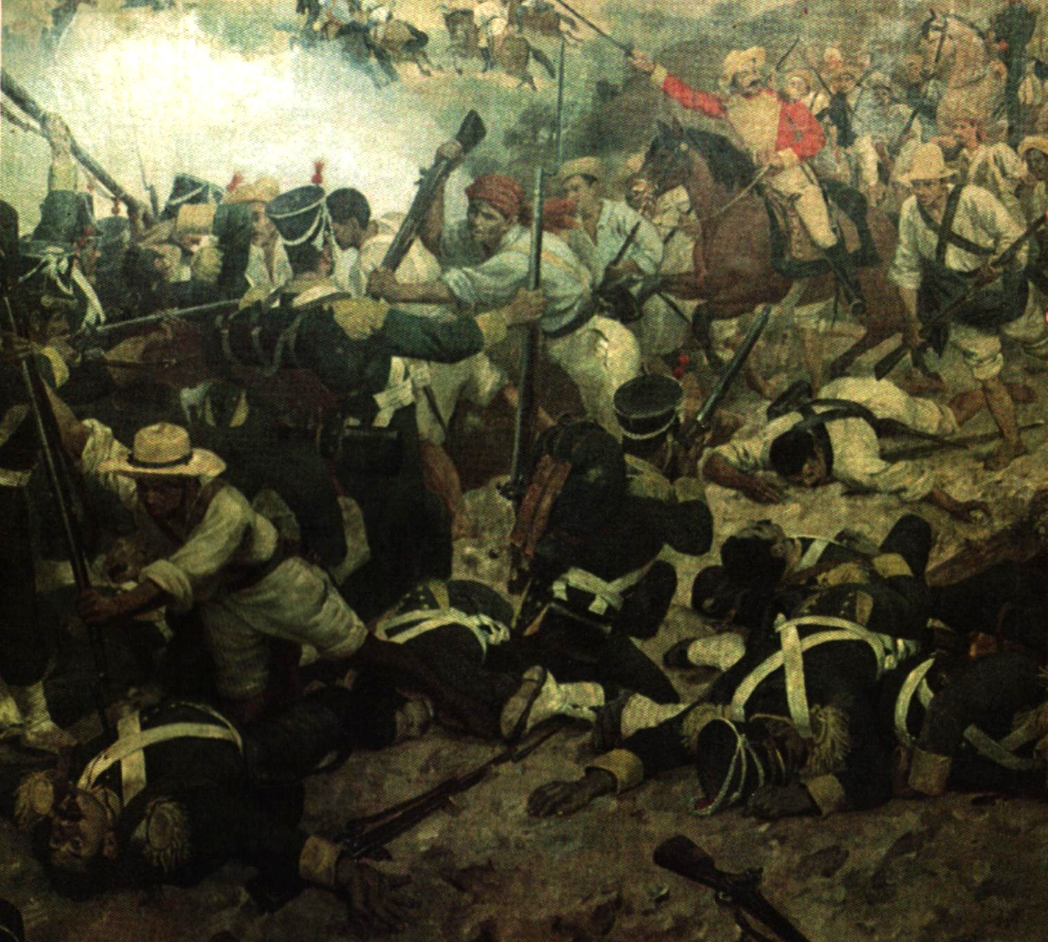 Fragmento de la Batalla de Boyaca. Oleo sobre tela. Palacio Federal Legislativo, Caracas - Venezuela